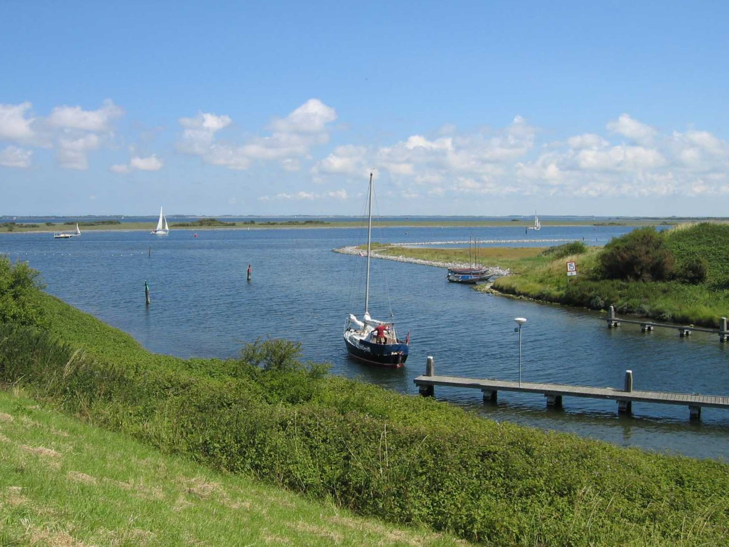 Einfahrt Brauwershaven